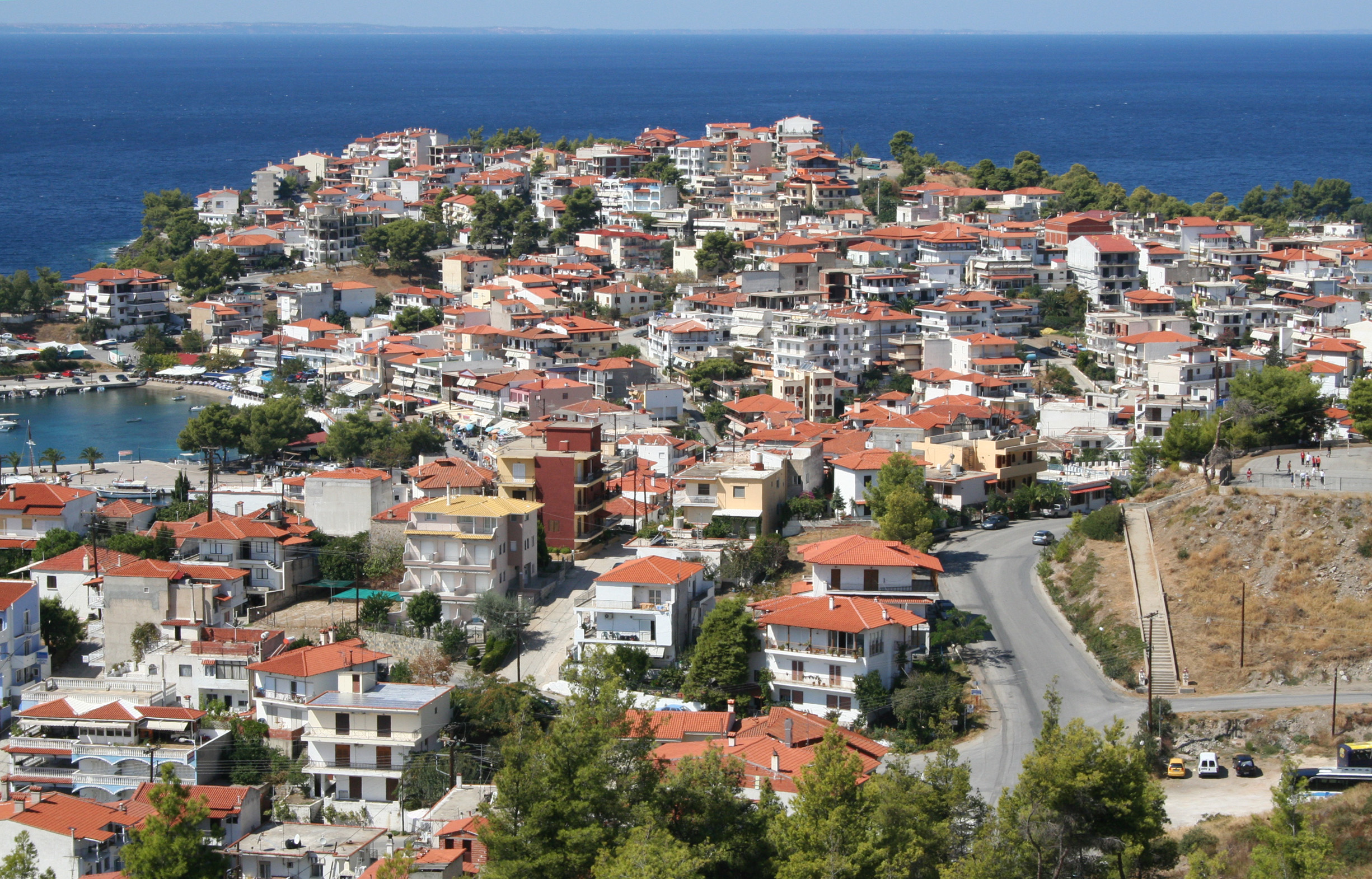 Blick auf Néos Marmarás